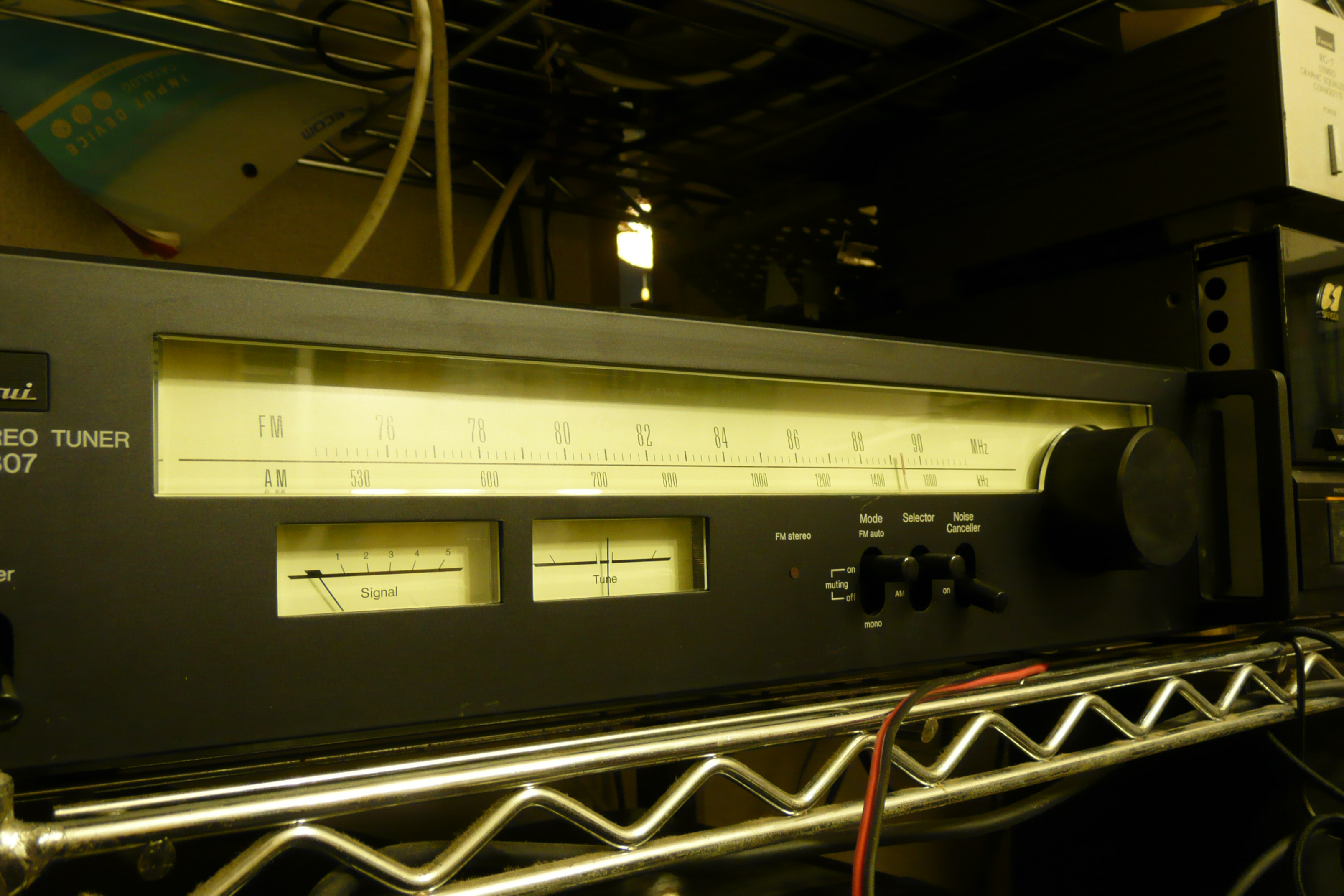 コンポネートオーディオ機器の一例。ラジオチューナー(受信機)。単独でラジオを聴くことはできず、別途アンテナを用意し、アンプを通してスピーカーから音を鳴らすために接続する必要がある。